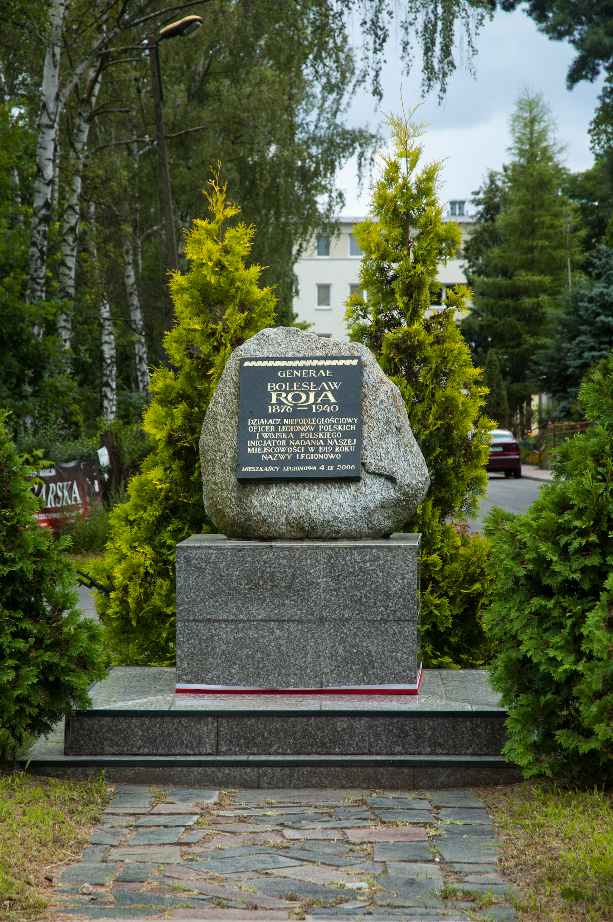 Generał Bolesław Roja - głaz upamiętniający - Legionowo